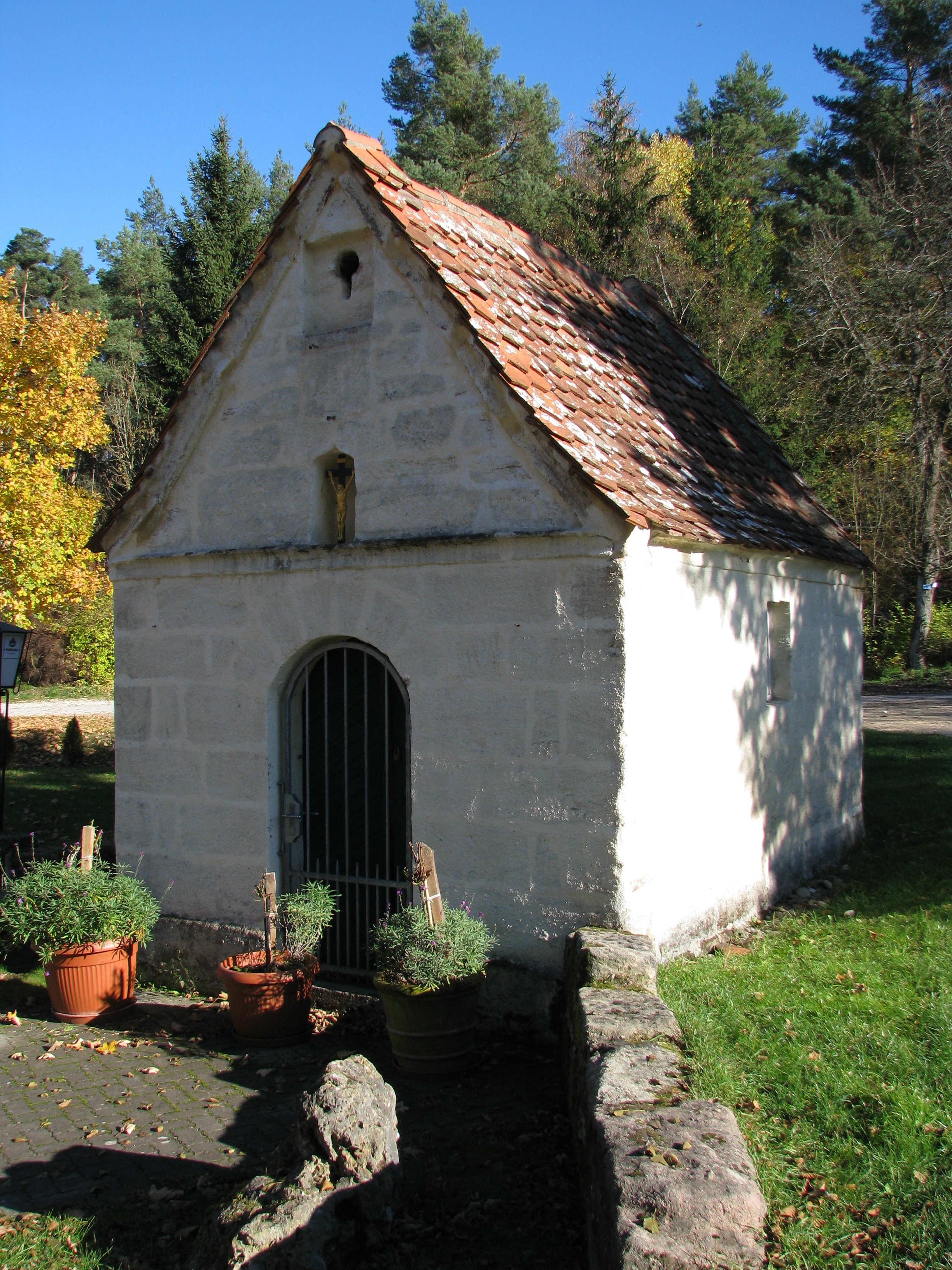 Fuchsmühle, Ortsteil von Hilpoltstein im mittelfränkischen Landkreis Roth, Kapelle